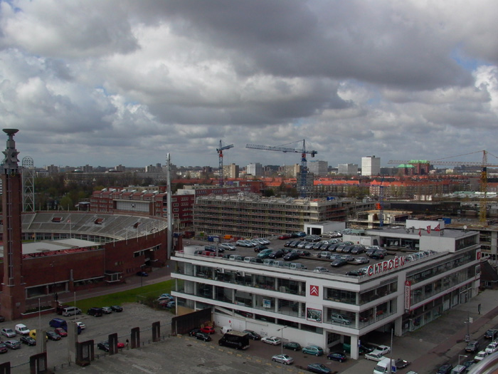 Olympisch Kwartier in Amsterdam in aanbouw met op de voorgrond het noordelijke Citroëngebouw en links de Marathontoren van het Olympisch Stadion. De foto is gemaakt vanuit het reuzenrad op de kermis op het Stadionplein door Daniel van der Ree op 7 april 2004.